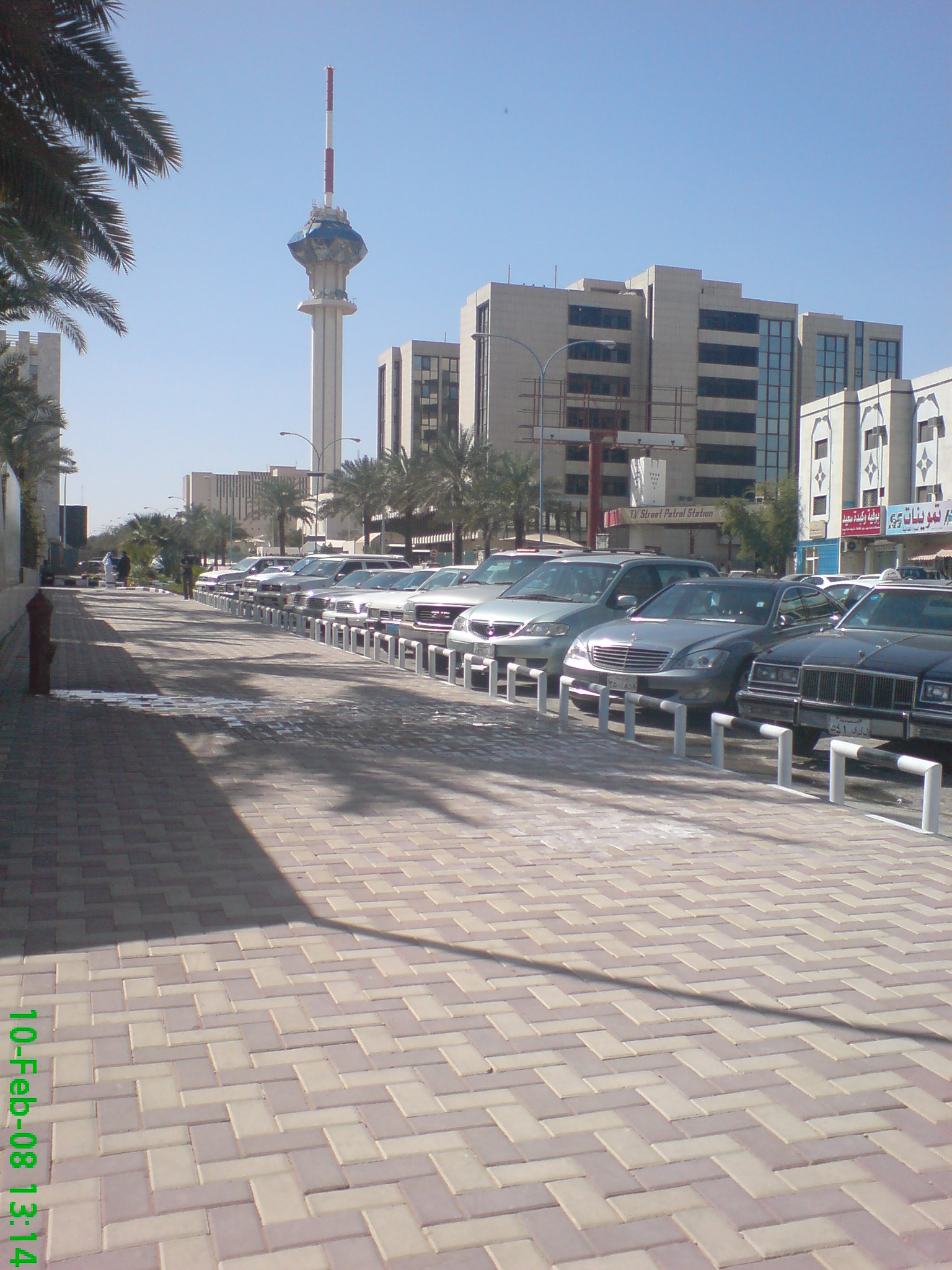 Riyadh TV Tower